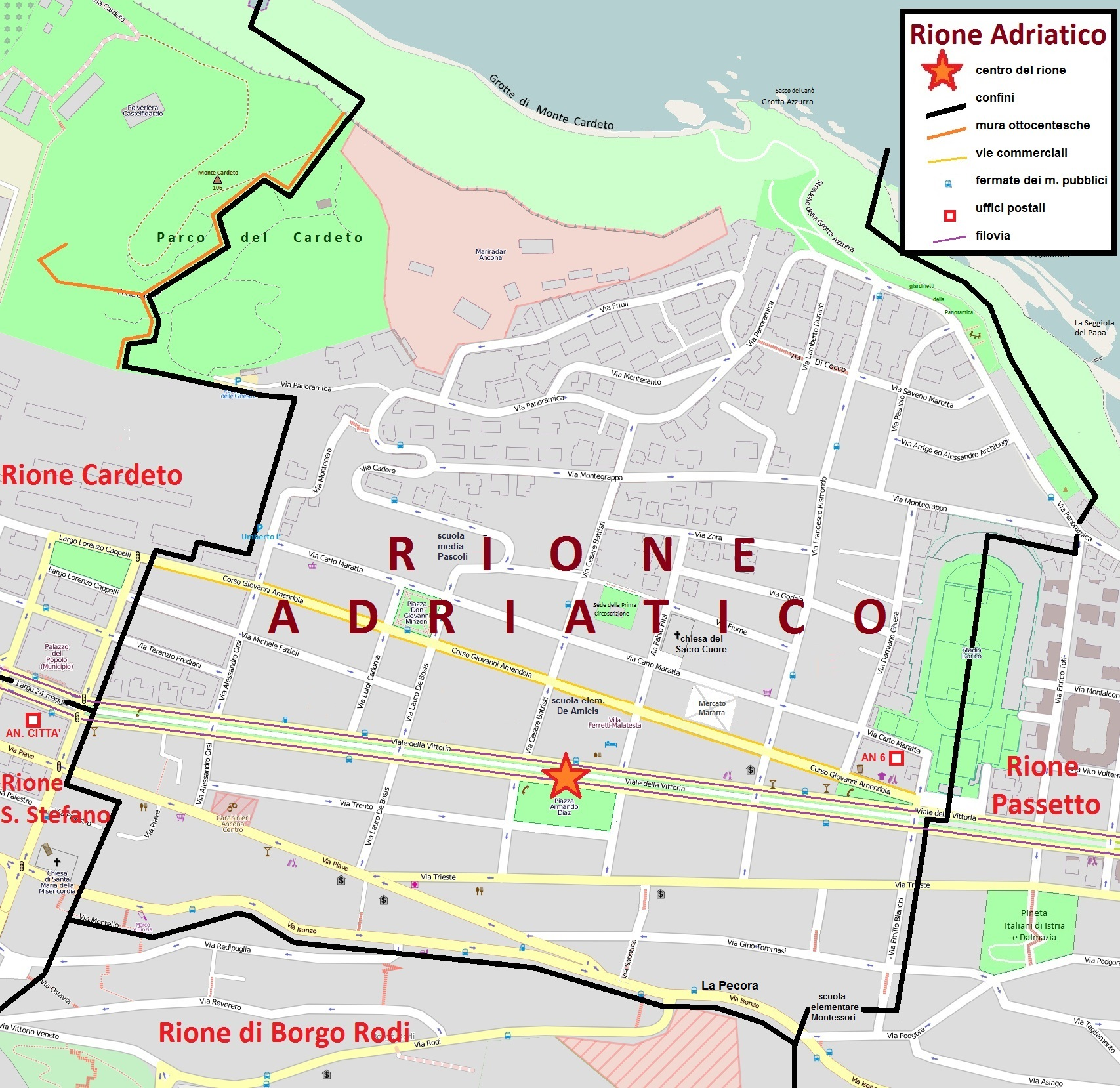 Mappa del Rione Adriatico di Ancona, con i confini, le vie, le piazze e i parchi.